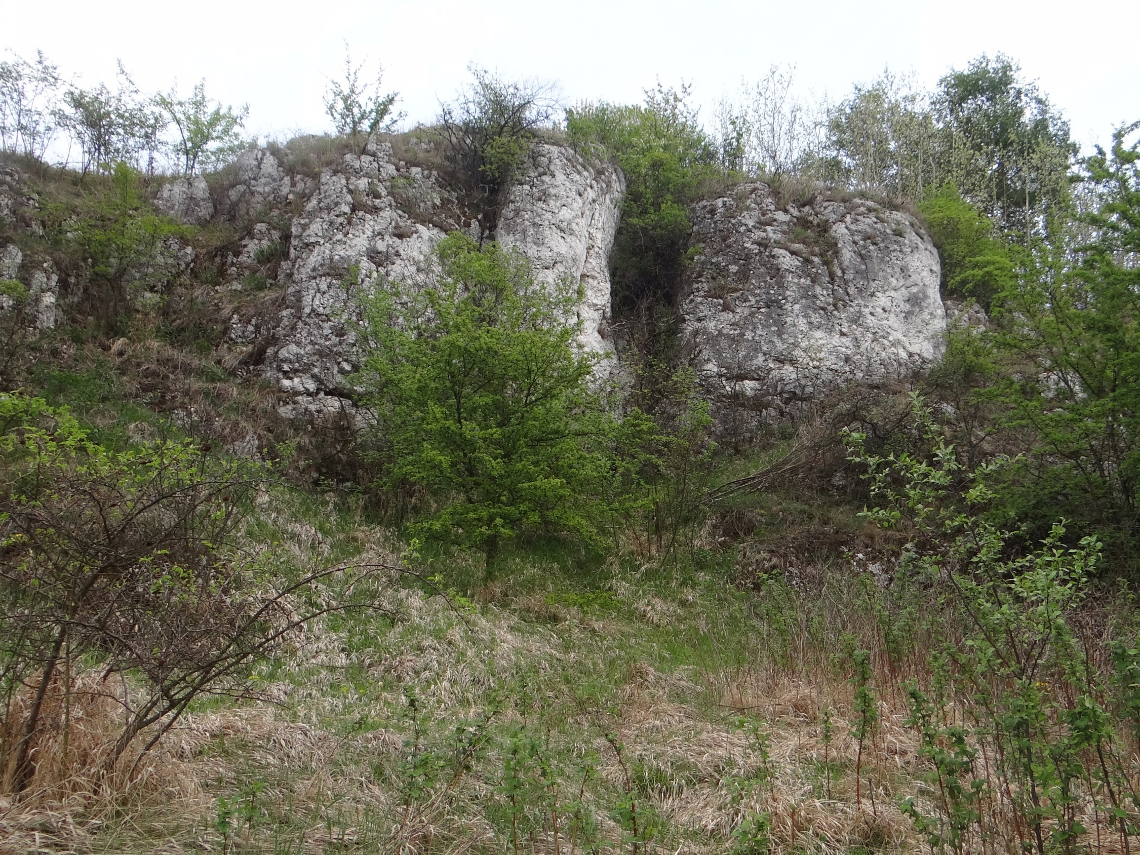 Skała Żytnia w miejscowości Bębło. Widok od strony południowej